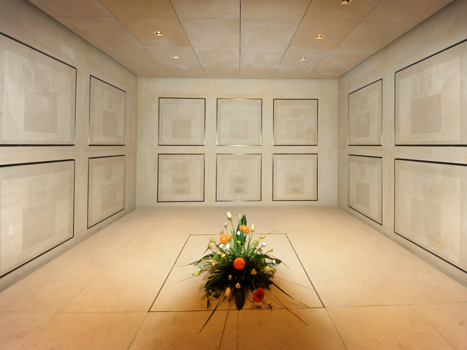 Die Grablege der Bischöfe unterhalb des Alten Chores im St.-Paulus-Dom in Münster.